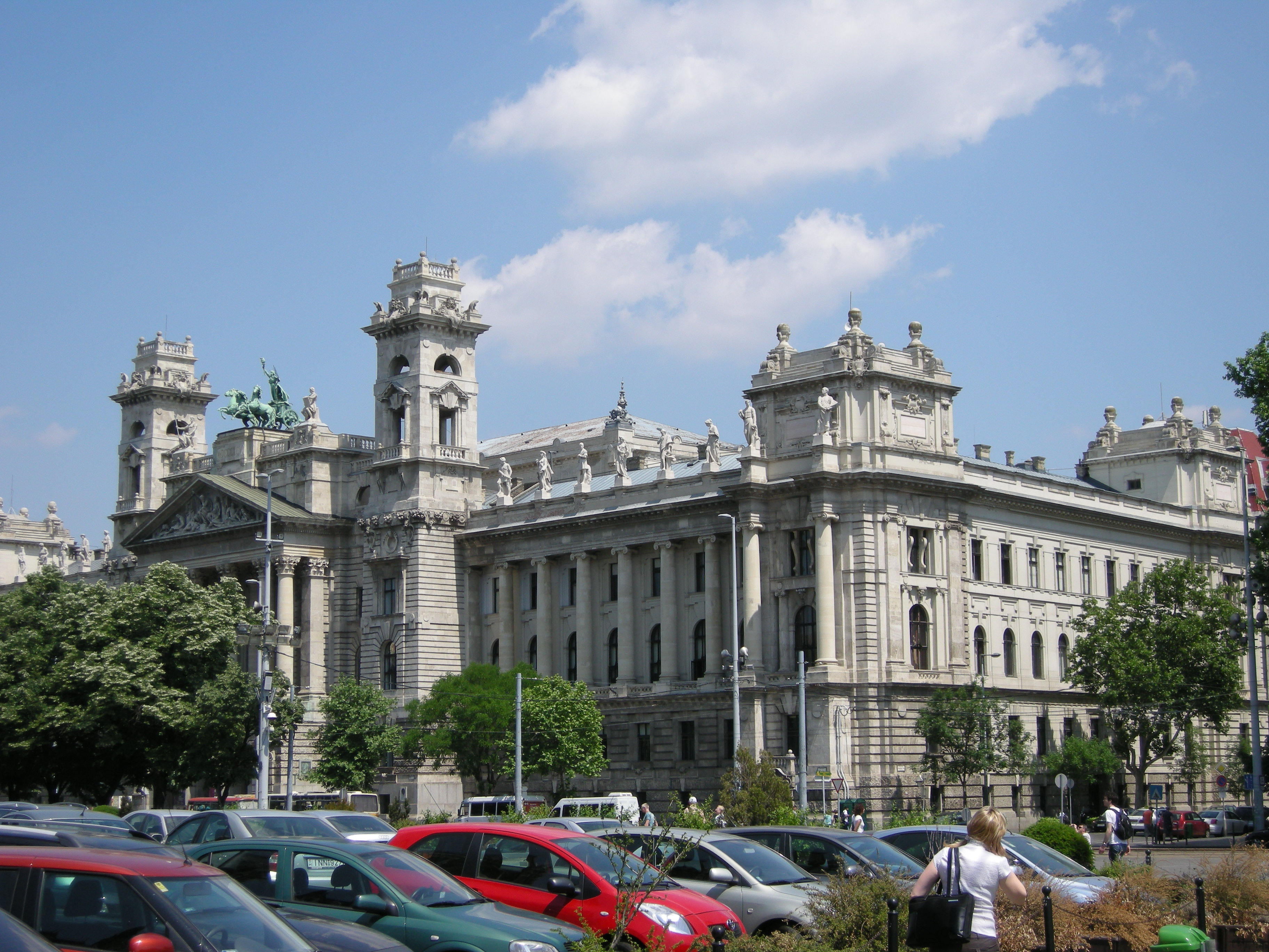 Budapest